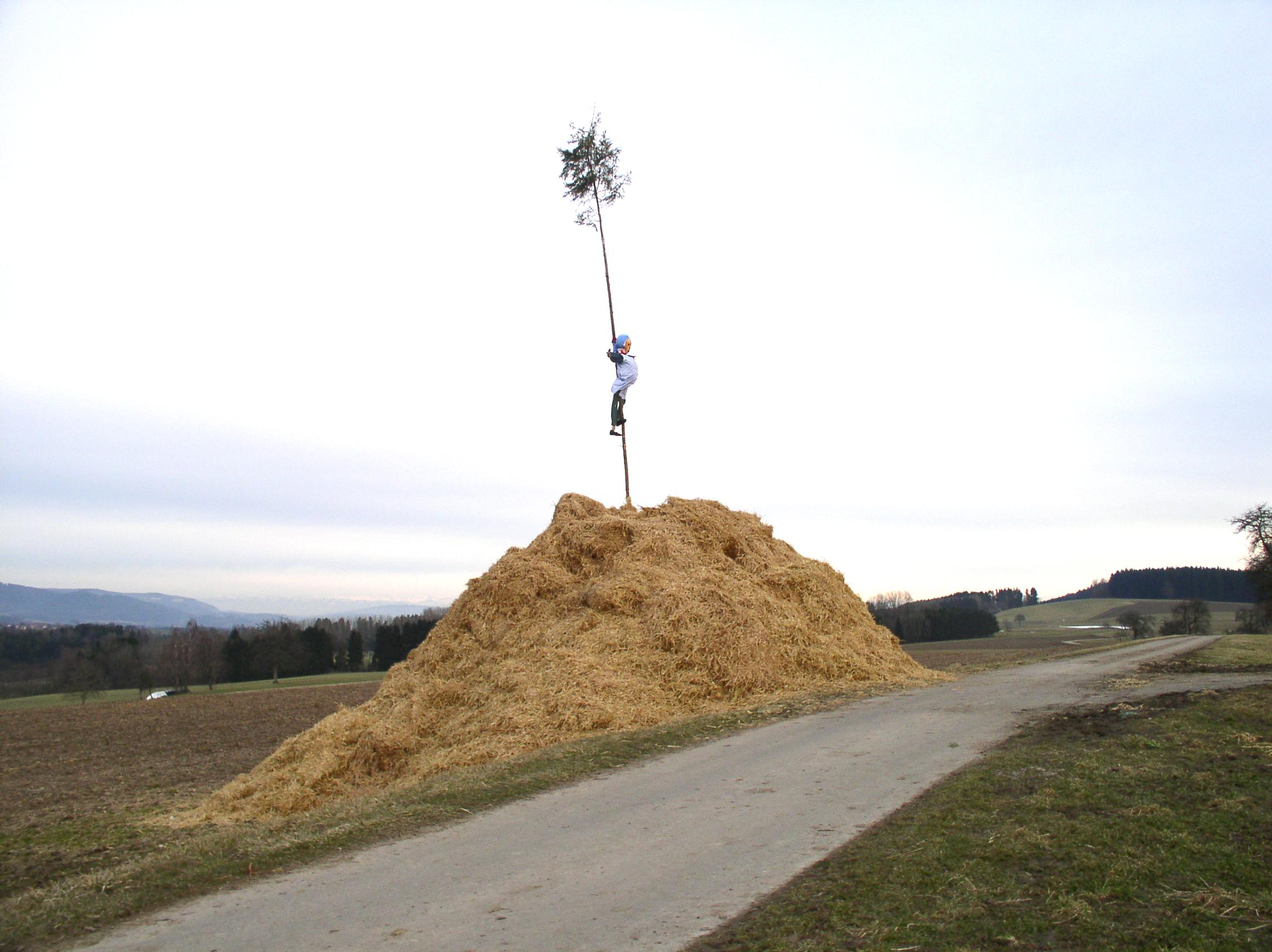 Strohhaufen mit "Funkentanne" und daran befestigter Hexenpuppe für das traditionelle Funkenfeuer am Sonntag nach Aschermittwoch in Herdwangen, Kr. Sigmaringen, Baden-Württemberg, Deutschland (9.3.2003). Pile of straw with a fir and a witch doll attached to it, for the traditional "Funken" bonfire on the first sunday of lent in Herdwangen, district of Sigmaringen, Baden-Württemberg, Germany (March 9th, 2003).